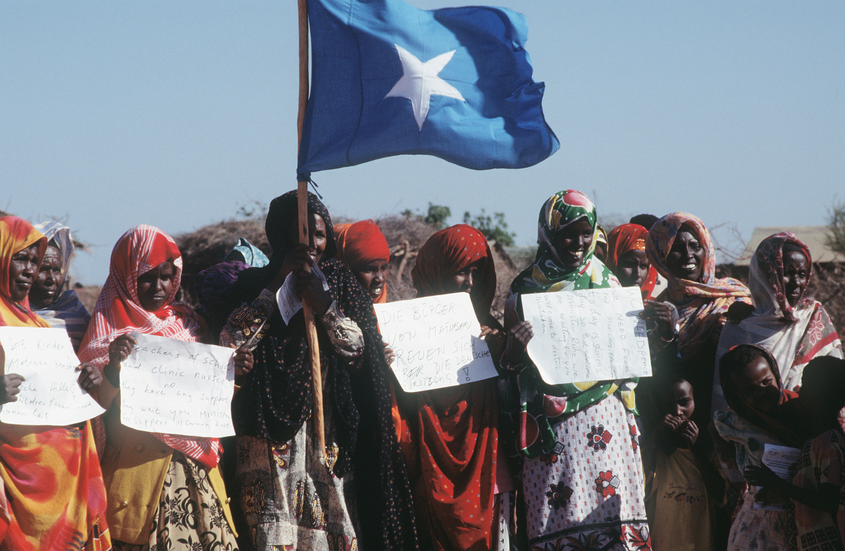 Citizens of Mataban hold signs thanking the Germans for their support during relief efforts. The Germans dug a new water well for the Somalis and the German Defense Minister dedicated the well.